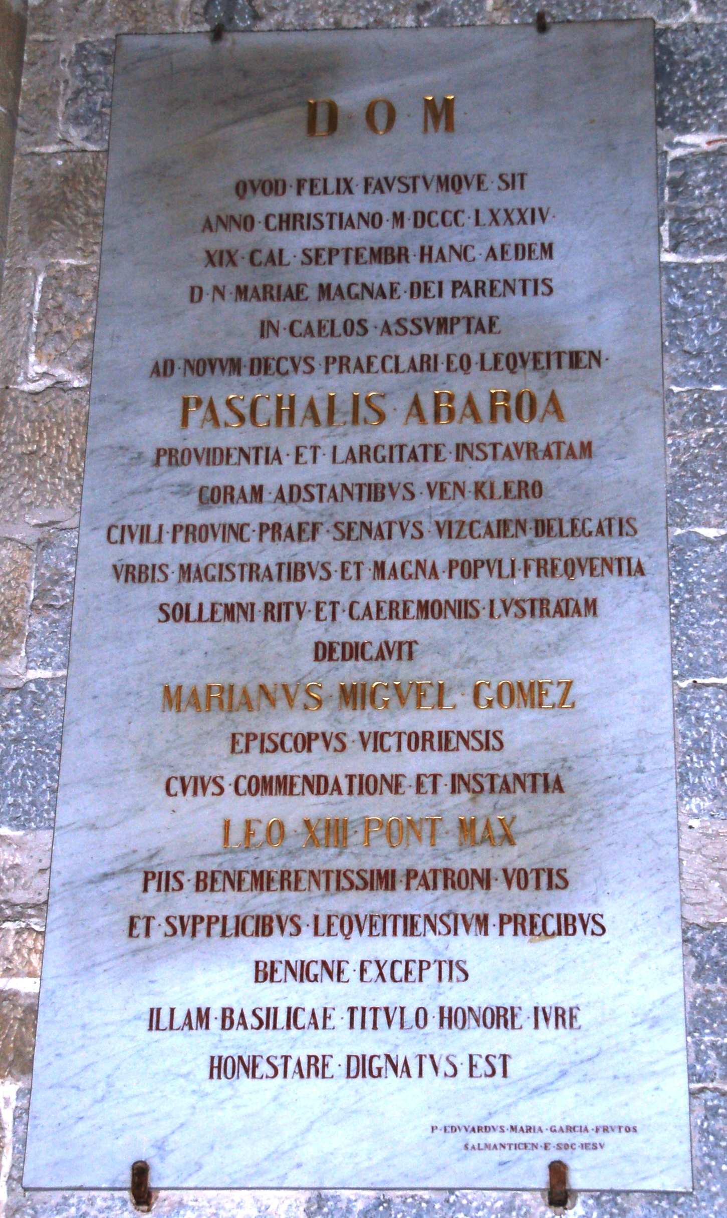 Placa memorial de la consagración de la Basílica de la Asunción de Nuestra Señora, Lequeitio (Vizcaya, País Vasco, España) en 1884.